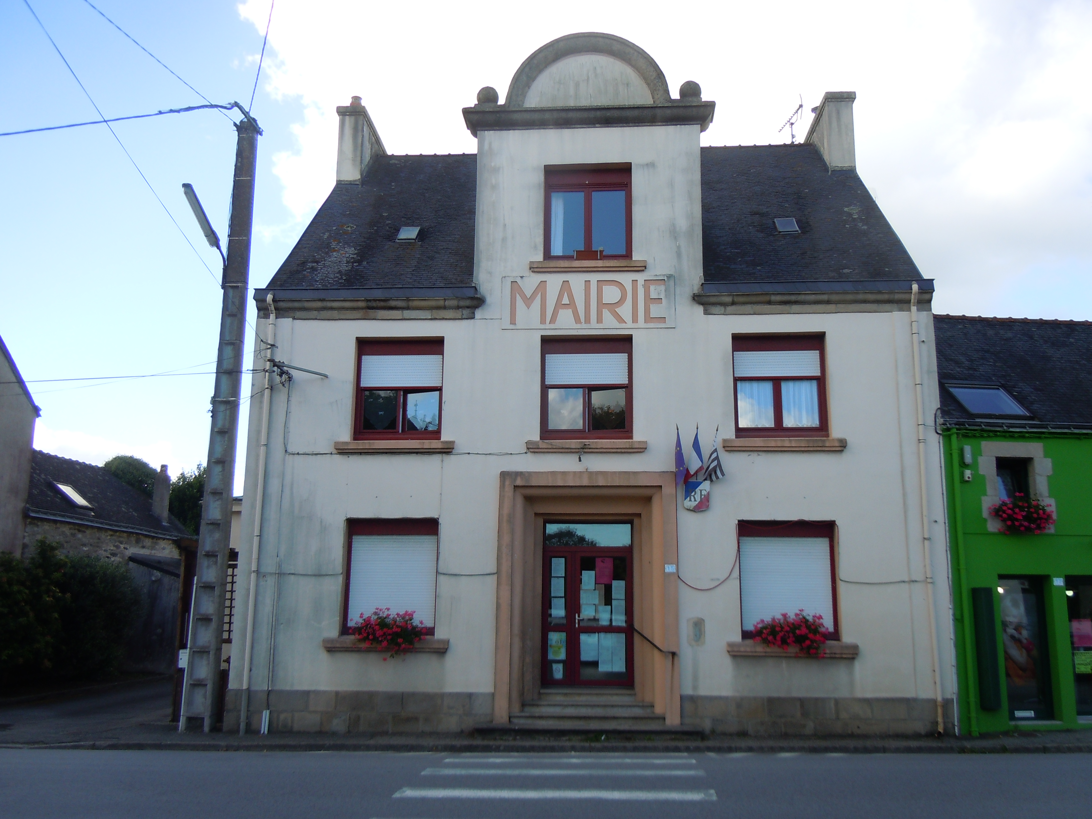 le bâtiment de la mairie de Roudouallec (département du Morbihan)